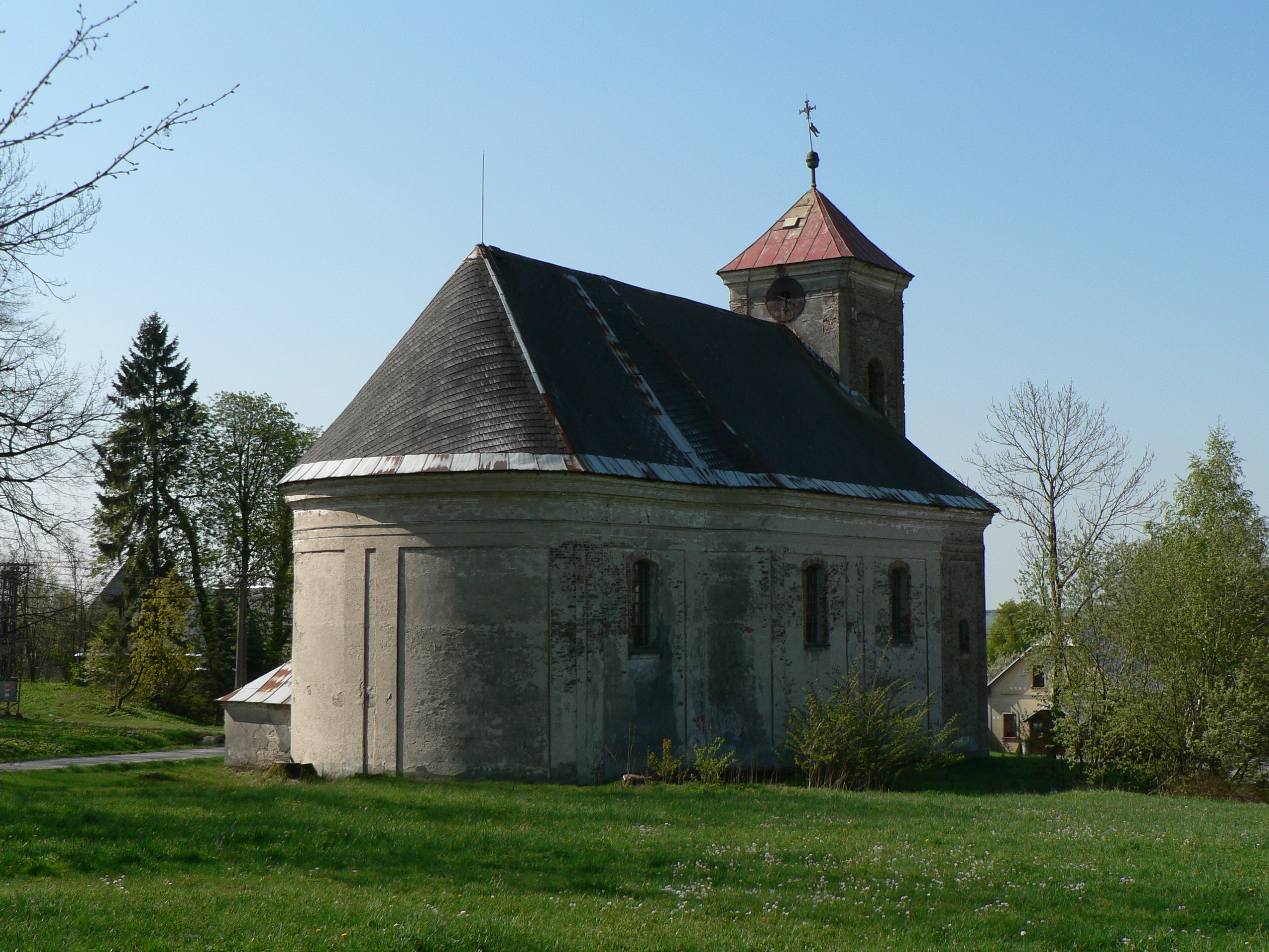 Kostel svatého Michala (Jiříkov)